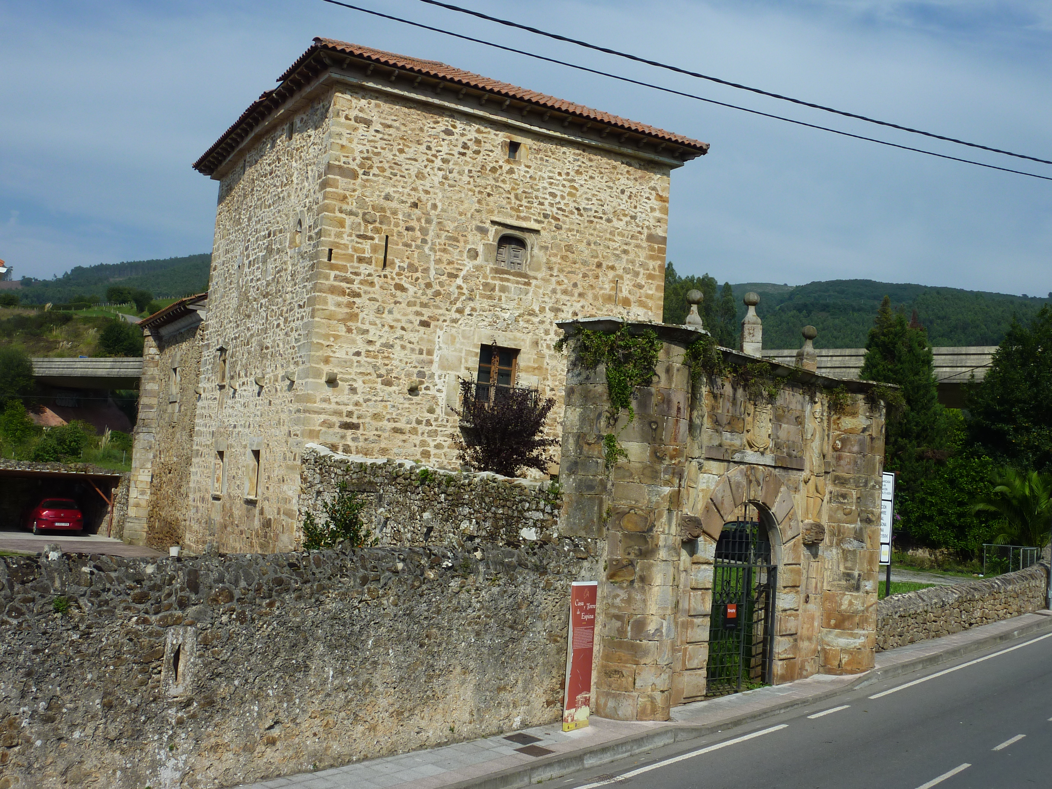 La Casona de Espina, con su Torre y Portalada en Ampuero (Cantabria, España)